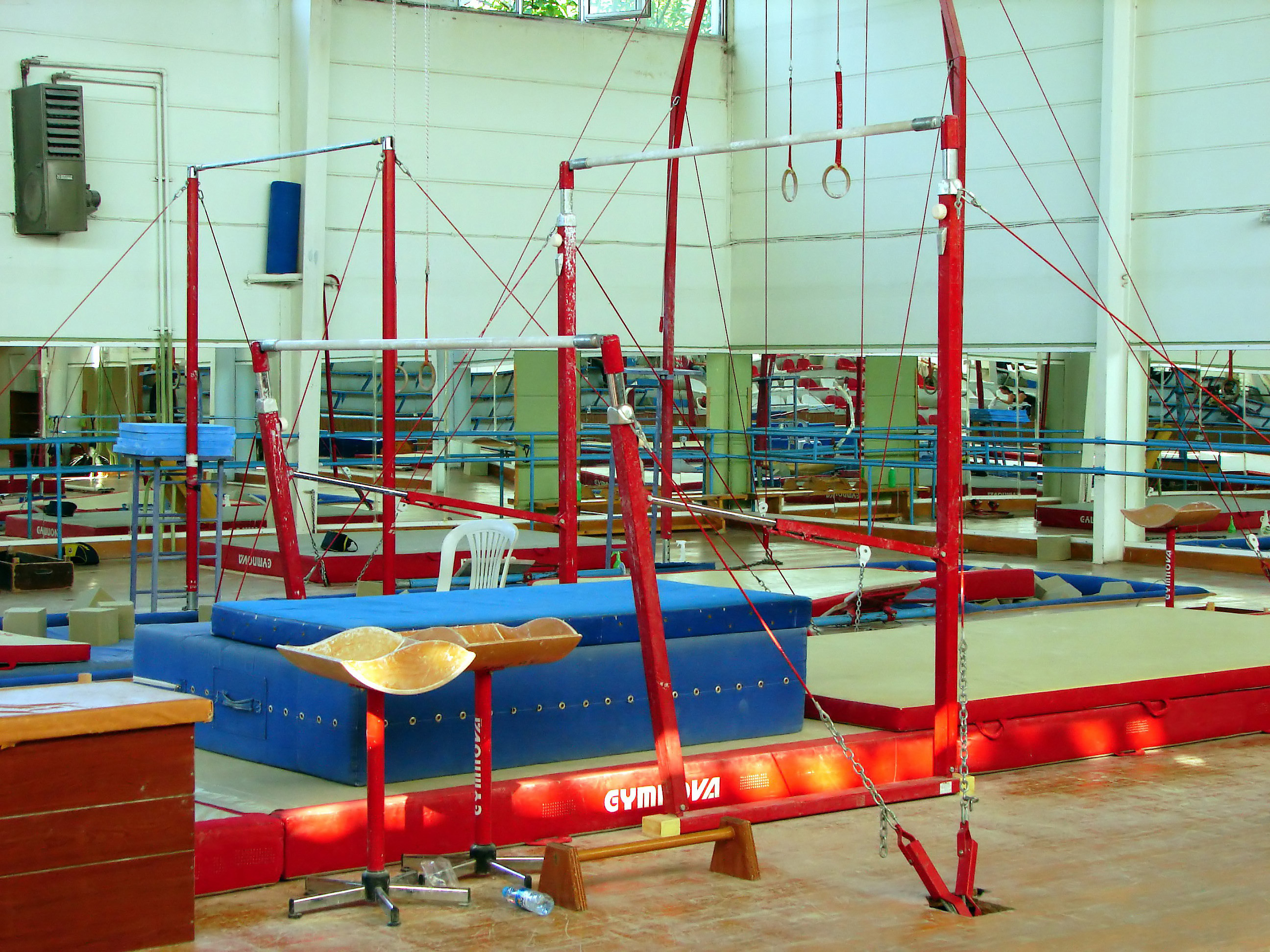 Gymnastics, GSGM, Bağlarbaşı Spor Salonu